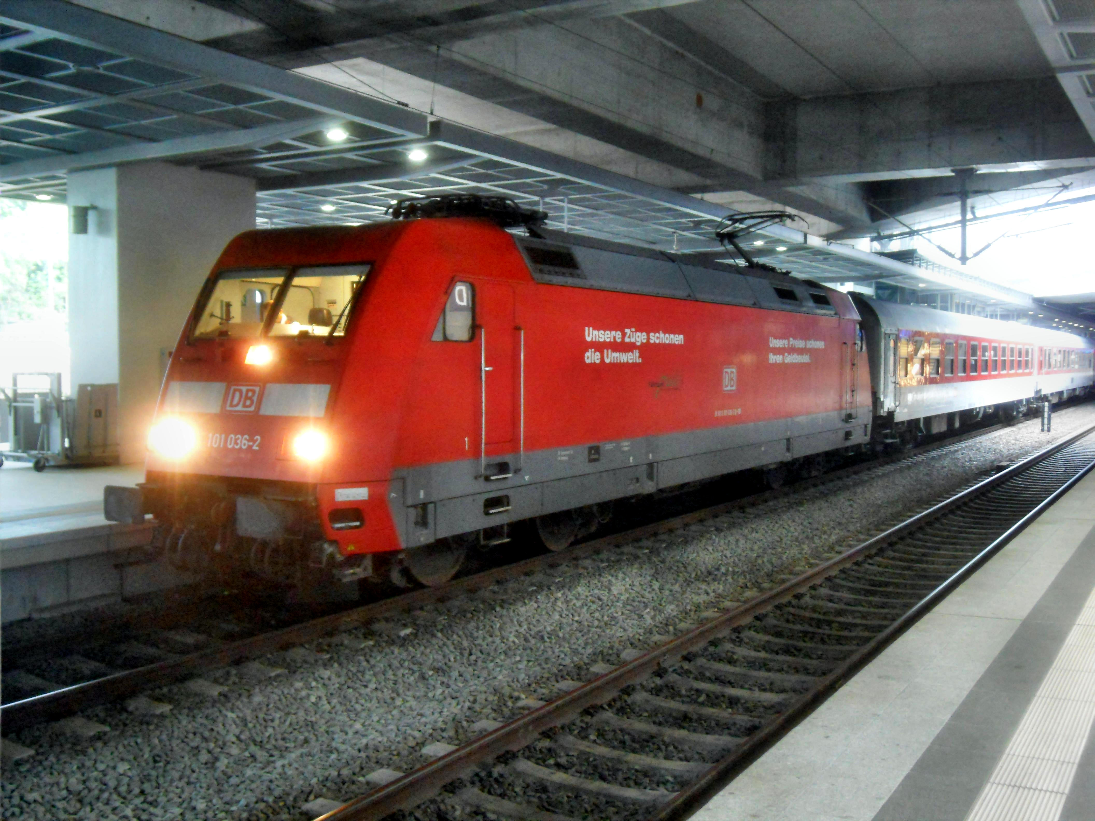 City Night Line mit Triebwagen der DBAG-Baureihe 101 im Bahnhof Berlin Südkreuz in Deutschland auf dem Weg nach Paris in Frankreich